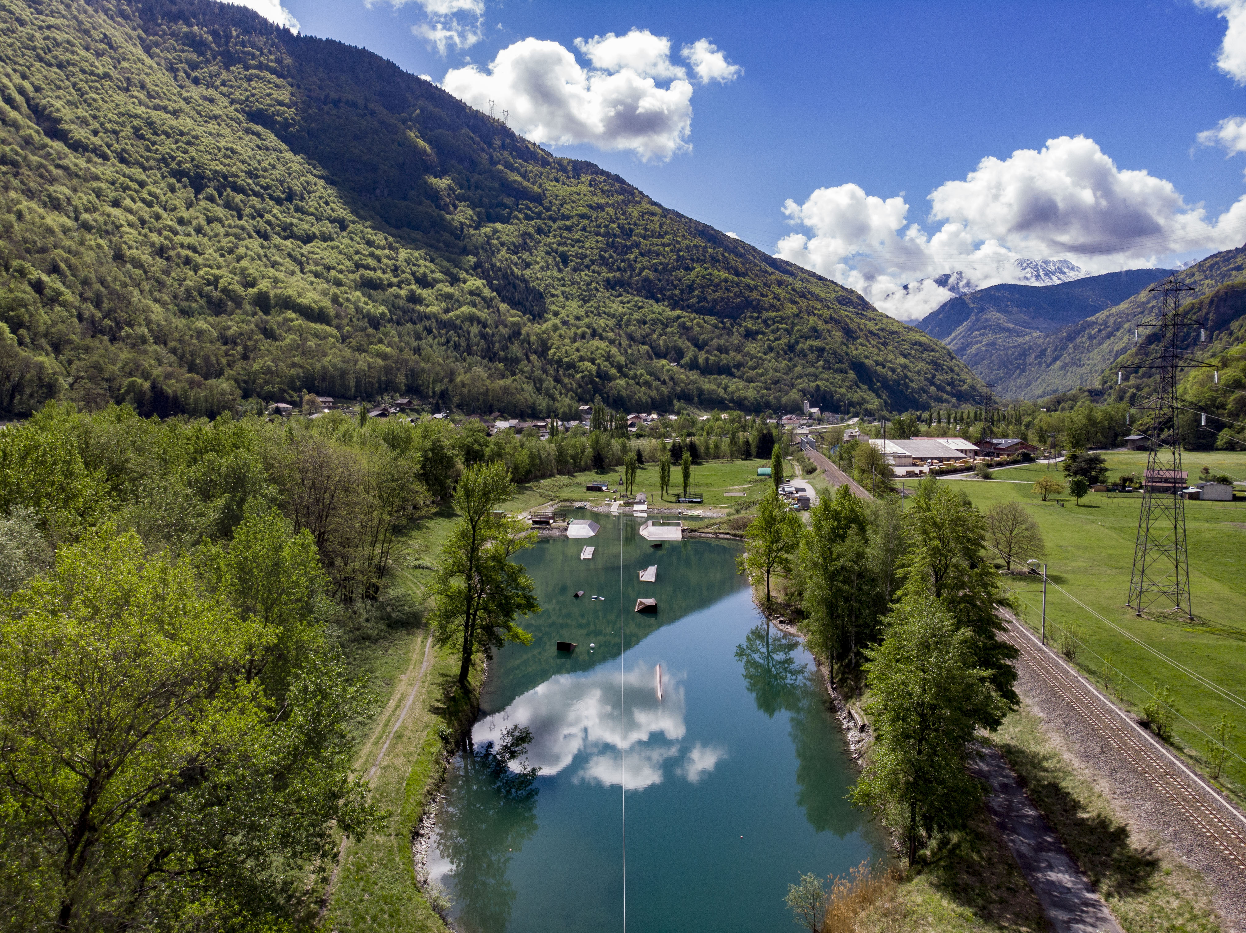 Une installation légère composée de deux pylônes et d'un câble de circulation